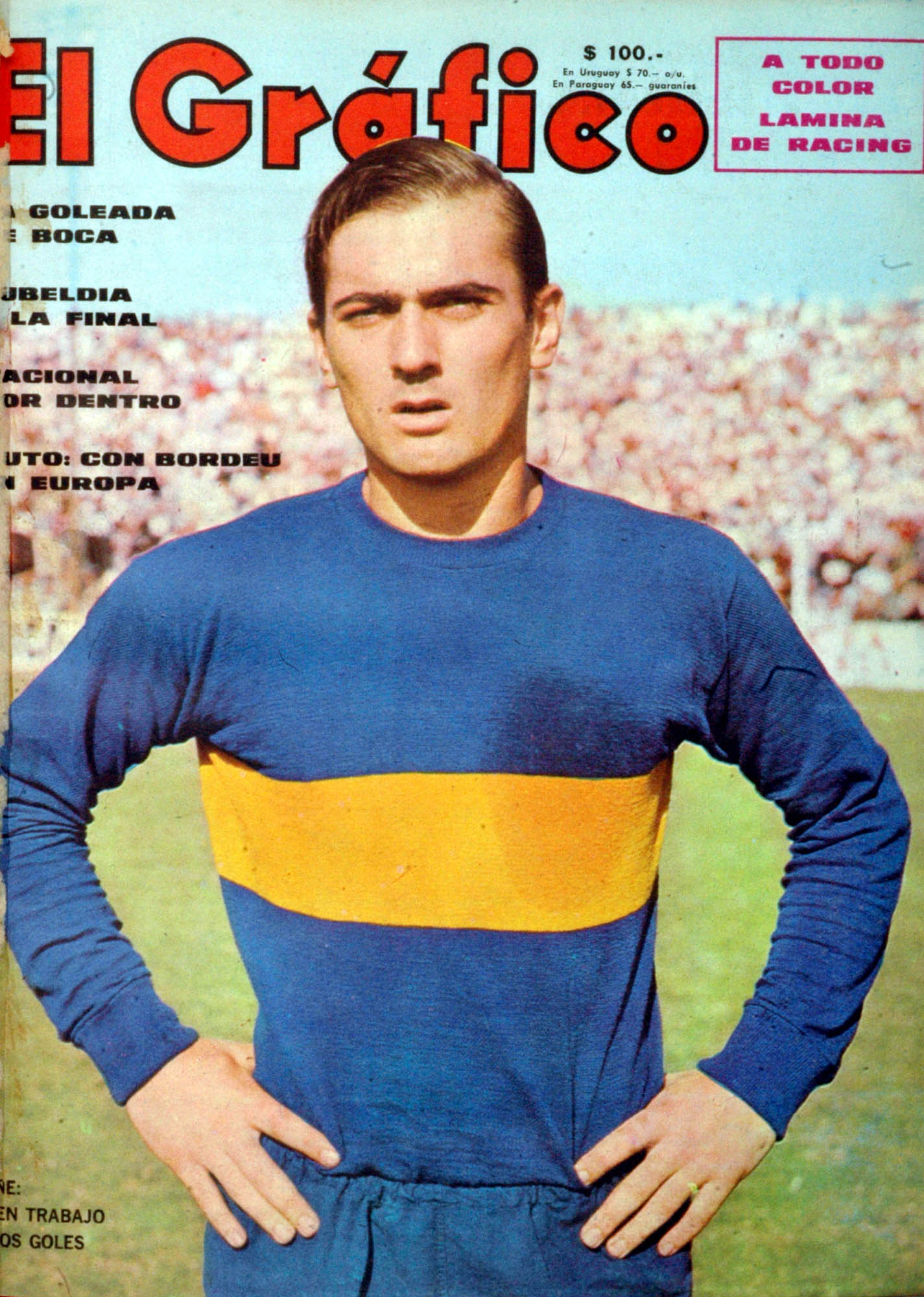 El Grafico del 13 de Mayo de 1969. Edicion 2588